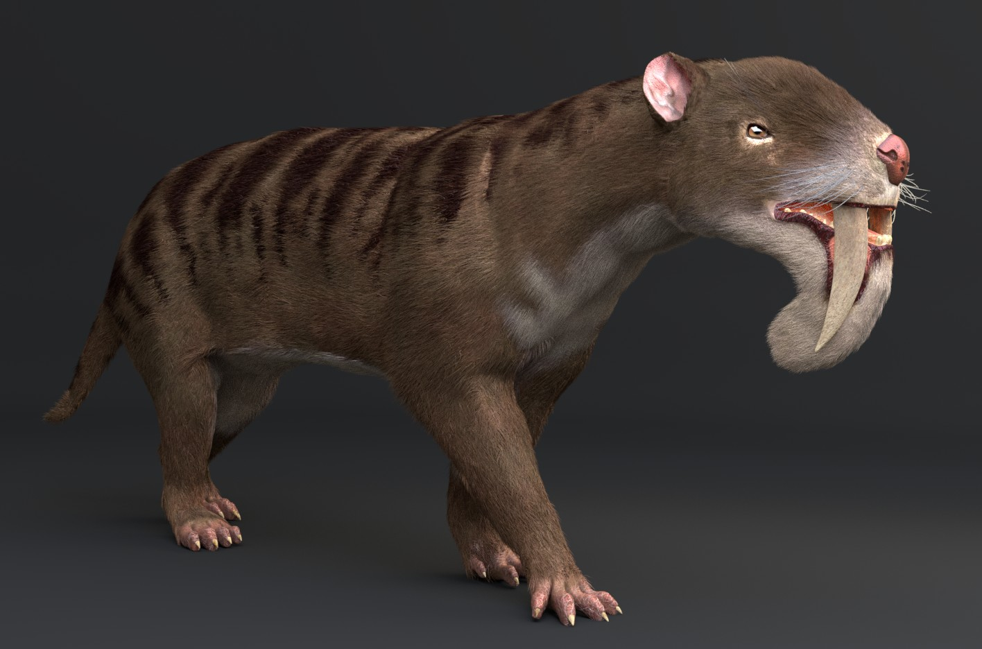 Thylacosmilus 3D model